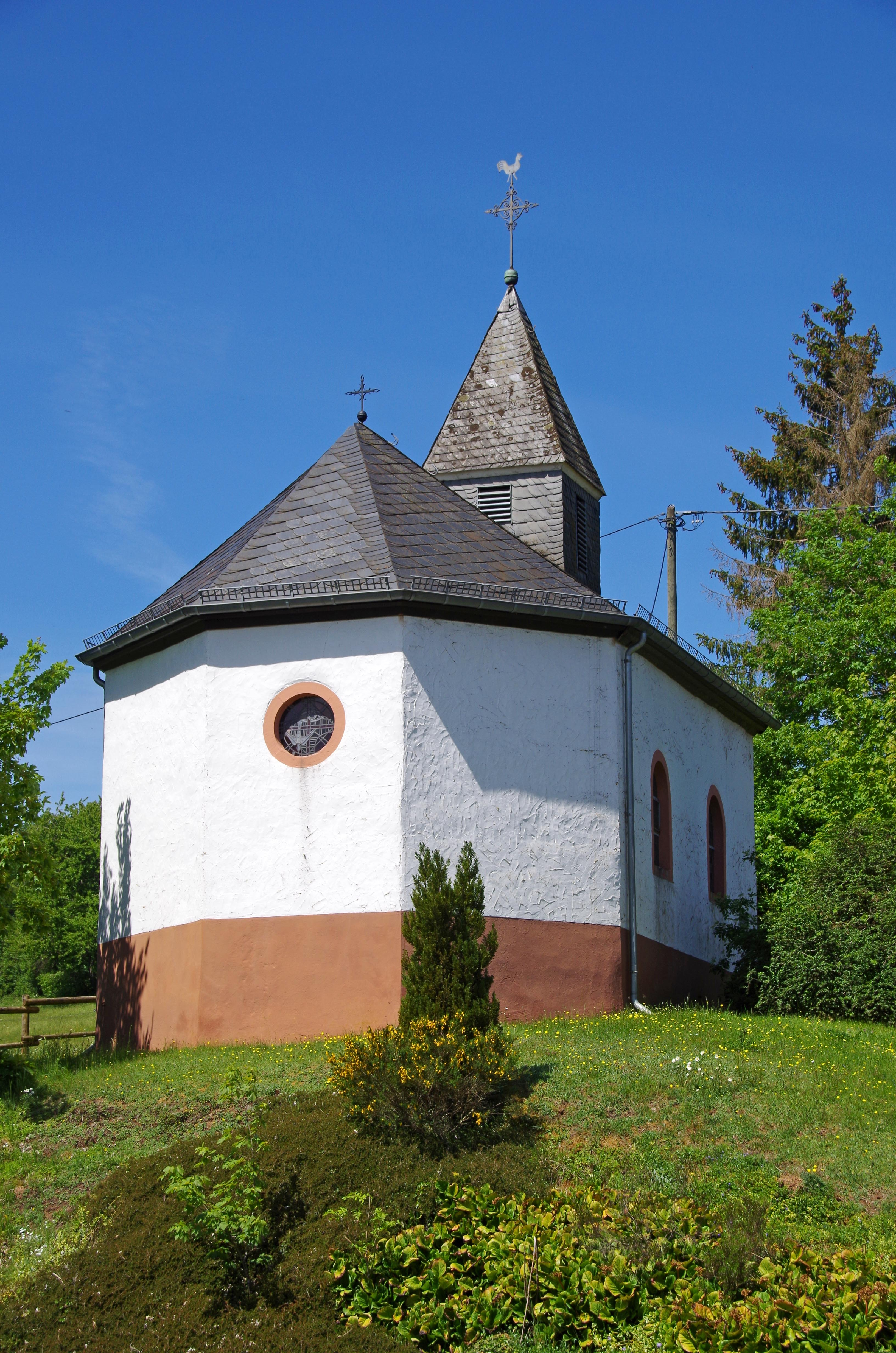 Niedermehlen, St. Katharina (1871)